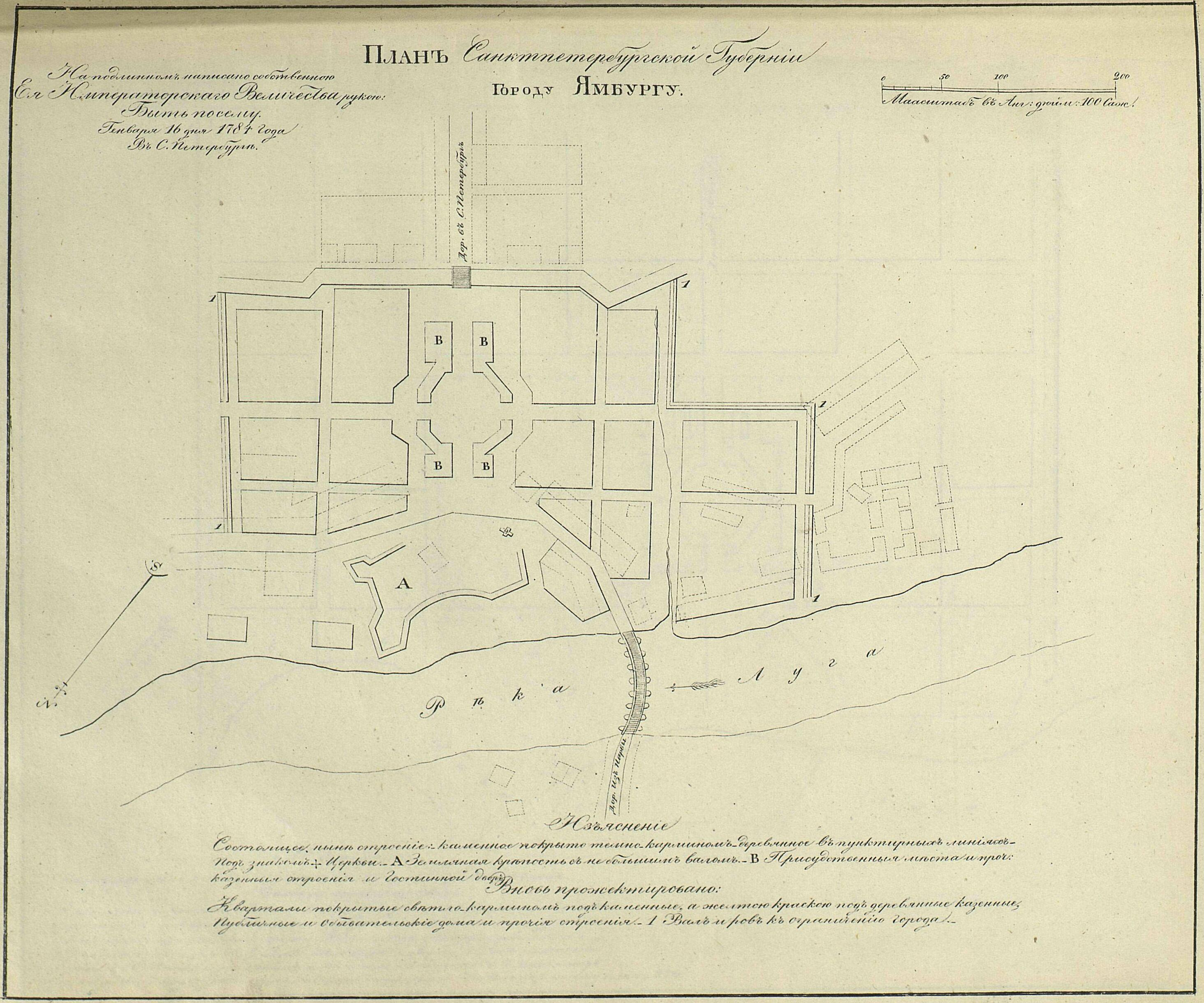 Полное Собрание Законов Российской Империи. Собрание первое. Книга чертежей и рисунков. (Планы городов).; 1839, Санктпетербургъ, Въ Типографіи II Отделенія Собственной Е. И. В. Канцеляріи.